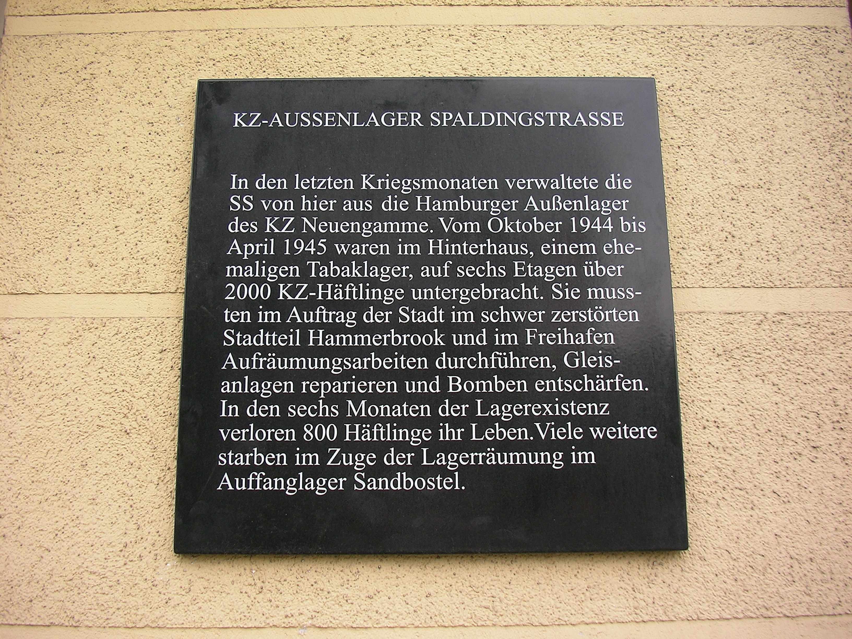 KZ-Außenlager Hammerbrook